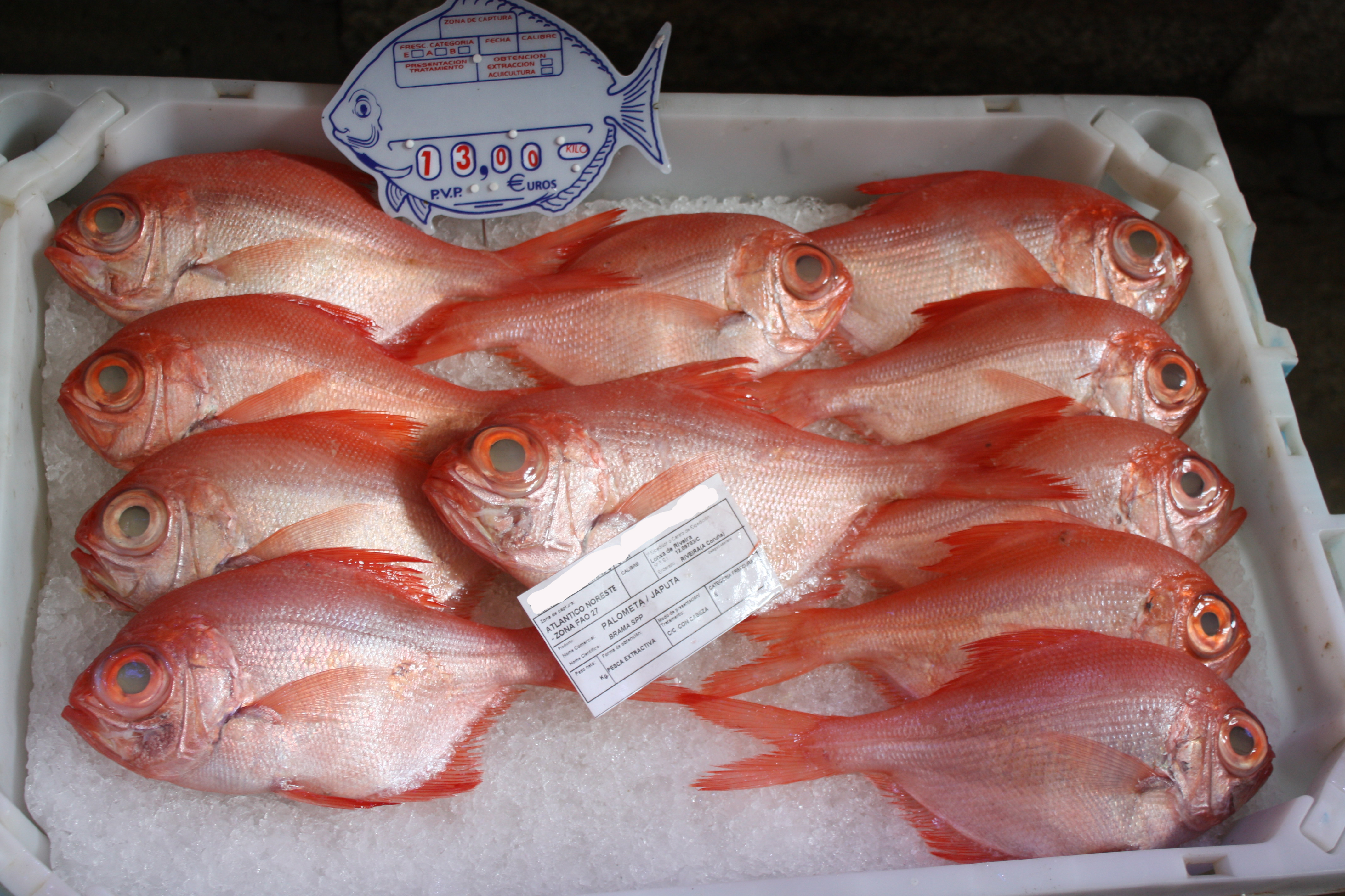 Castañetas encarnadas (Beryx decadactylus) expostas á venda na praza de abastos de Santiago de Compostela. A etiquetaxe é incorrecta e corresponde a outra especie (castañeta ou palometa, Brama brama)